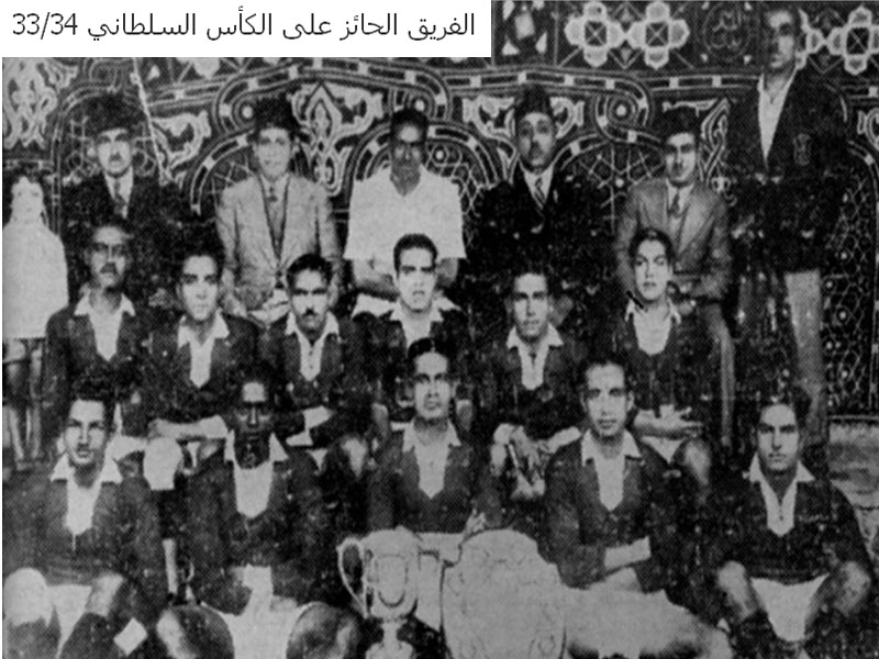 اللاعبين الذين مثلوا النادى المصرى فى الأربعينات (عبد الحليم مصطفى- حمام- أنور أردش- محمد حباجه- حلمى ابو المعاطى- سعد الشربينى- محمد الكتاتنى – الداودى- محمد العدنى- لطفى مسلم- حمدين الزامك- محمد جوده- محمد حسن- محمود الفحله- موسكاتيلى- كمال عياد- سعيد الوحش- حسنى عبيد- السيد سالم- ألدو- ألبرتو لوكسينى- احمد عبد الحميد) كابتن الفريق ( محمد جودة و محمد حسن و حمدين الزامك ) وفى هذه الفترة حقق جيل الثلاثينات والأربعينات بطولة دورى القناه وأحرز هذه البطولة 17 مرة متتاليه من عام 1932 حتى عام 1948 وكان ينافس فى هذه البطولة الكثير من الفرق الأجنبية والمصرية حتى أن قال النقاد الرياضيين فى هذه الفترة إن هذه البطولة هى الأقوى من بطولة الدورى المصرى الحالى . وحقق المركز الثانى والوصيف فى بطولة كأس مصر عام 1945 وعام 1947